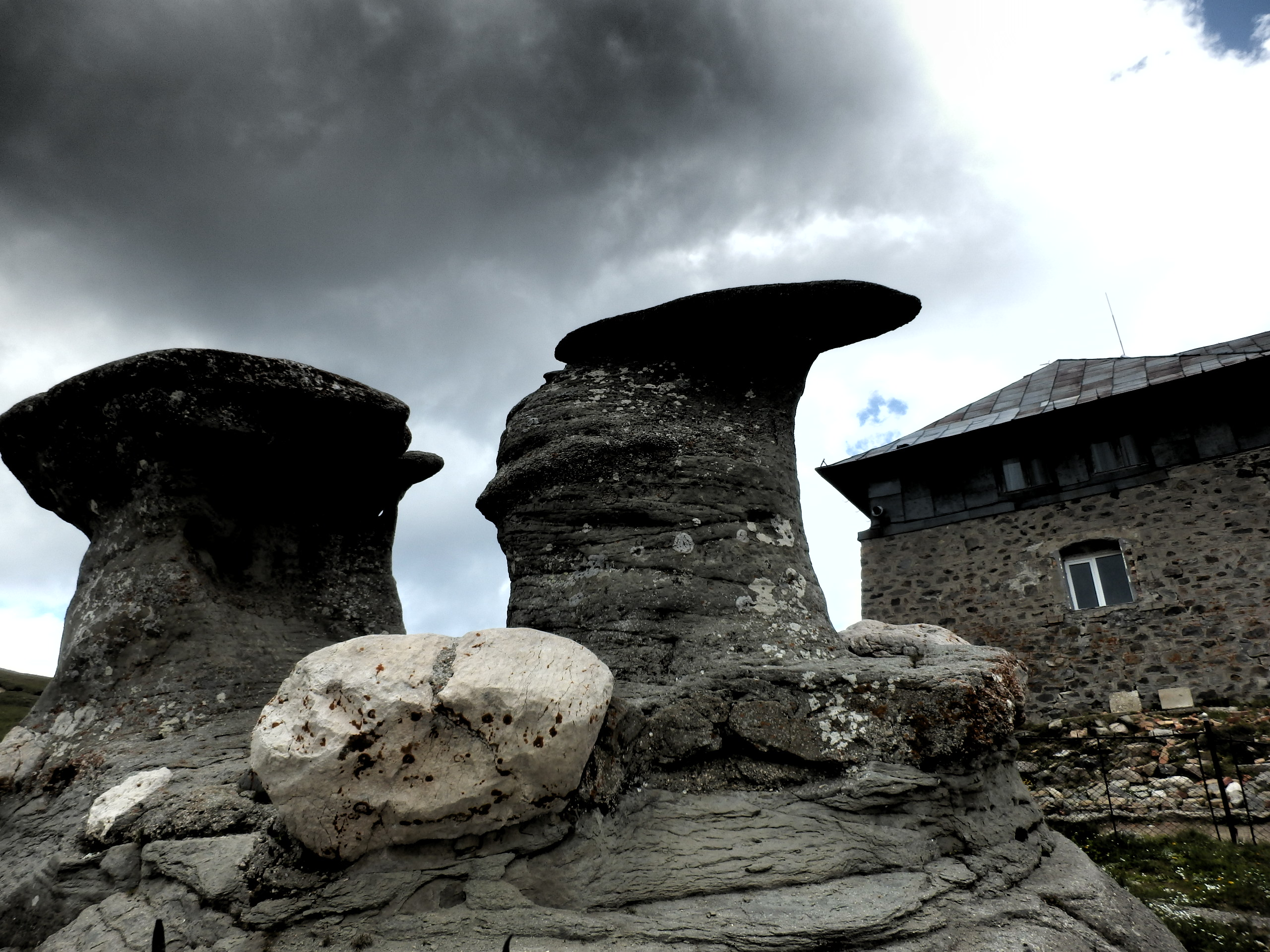 Prahova, România by Stefanjurca